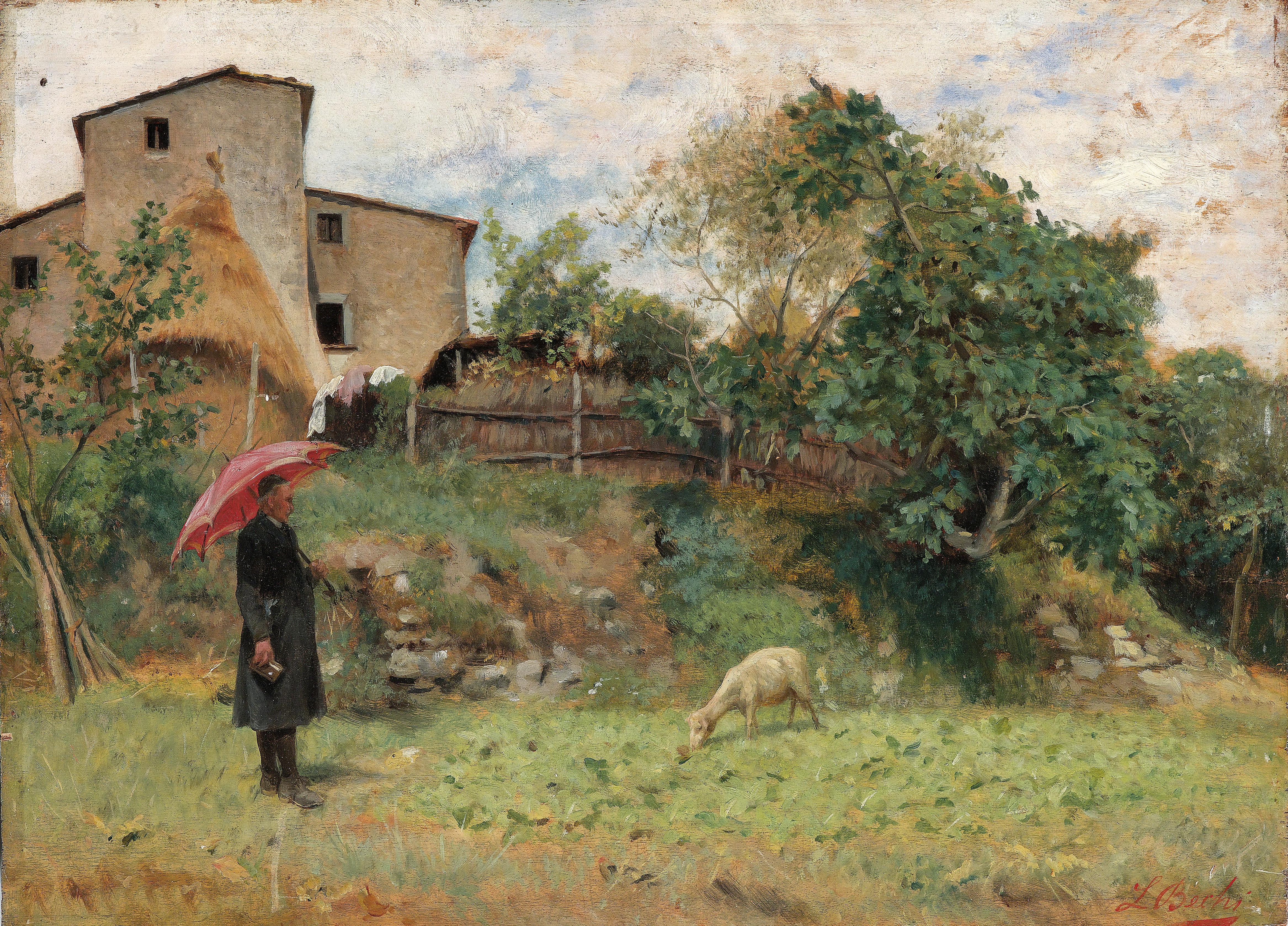 Betrachtung des Schäfchens